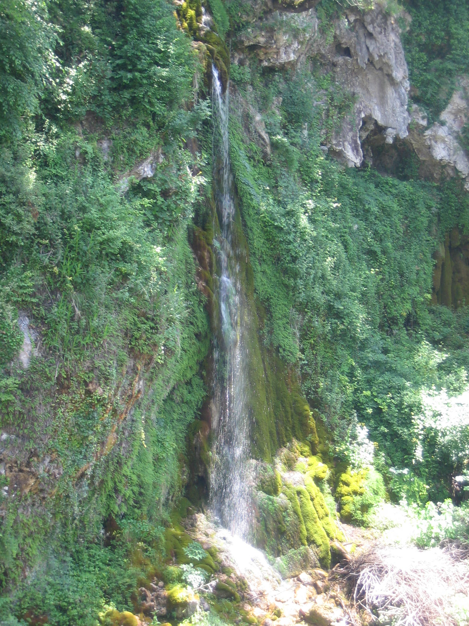 Wasserfall Saut du Loup in der Provence